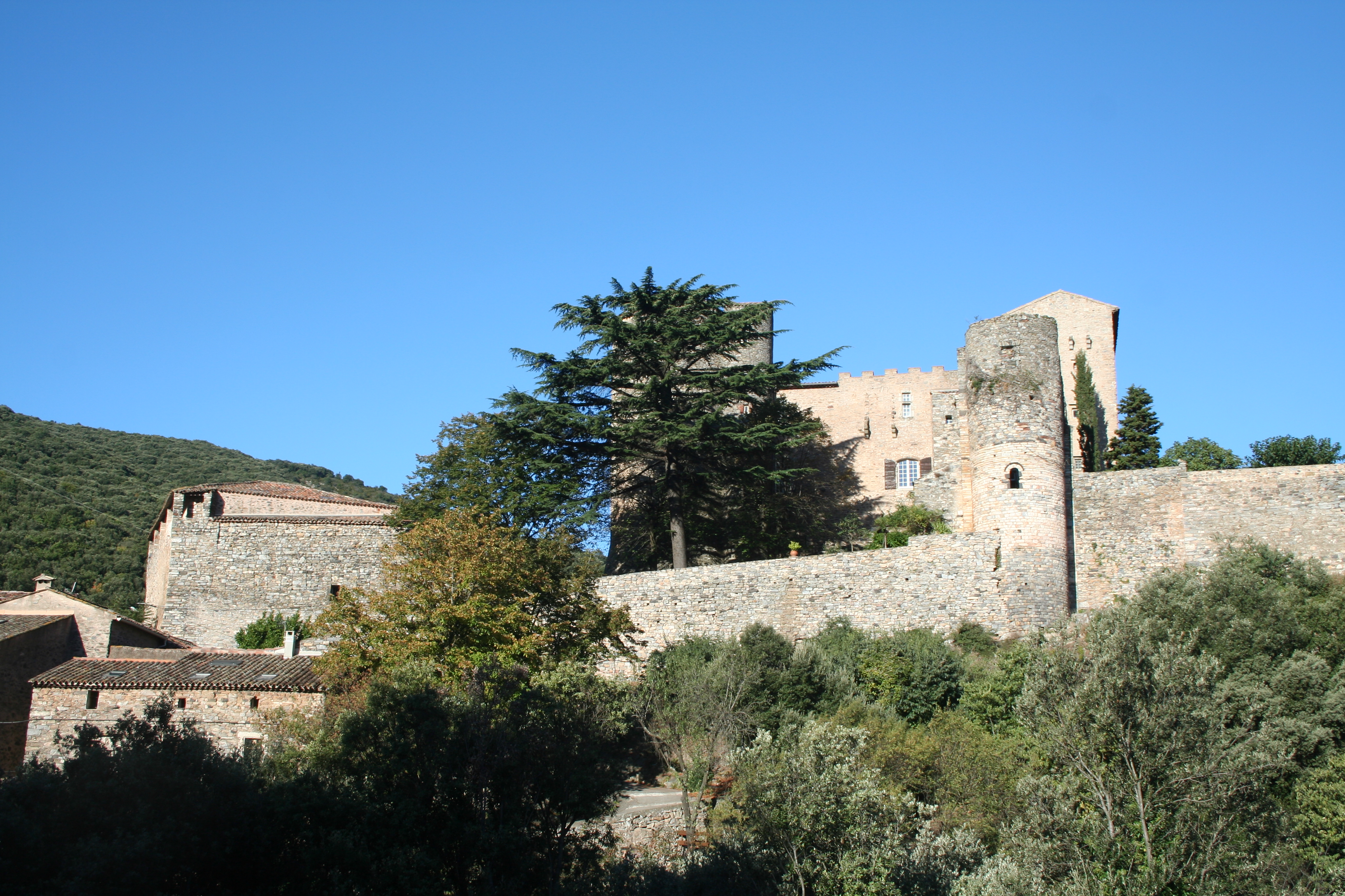 Pézènes-les-Mines (Hérault) - le château.